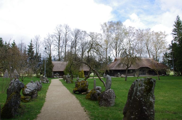 Uoginių kaimo amatų centras